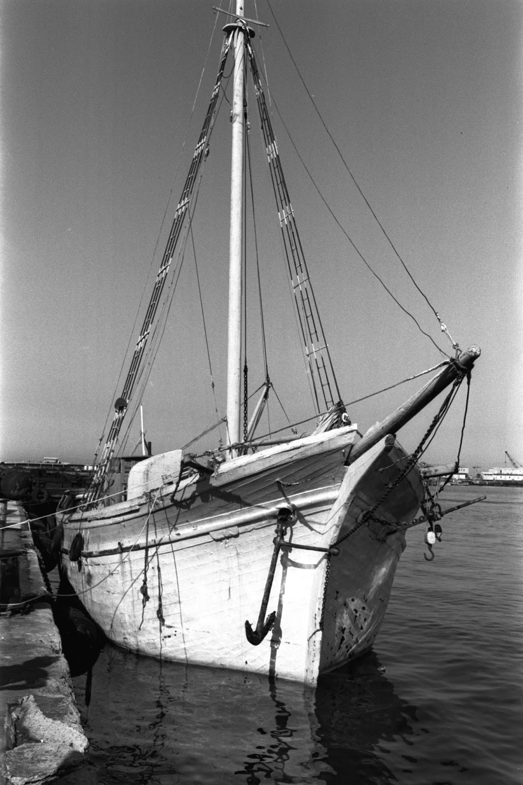 הספינה שהביאה את סירת המחבלים שחדרה למלון סבוי נתפסה והובאה לנמל